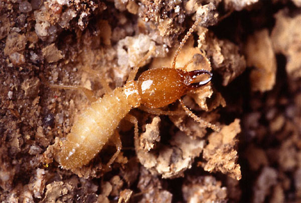 Термит